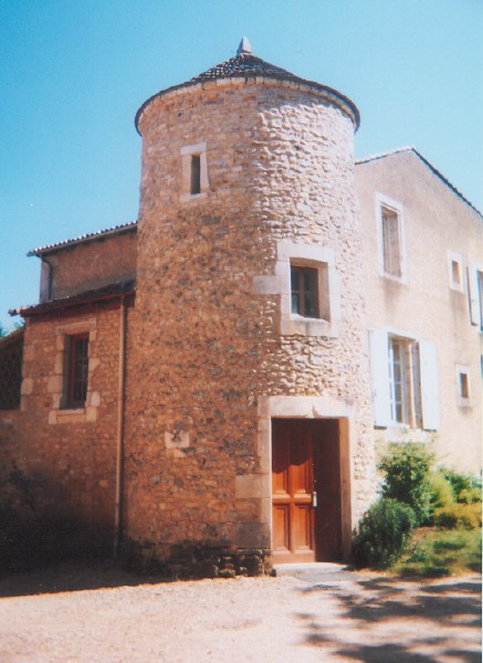 Description : Tour de la fin du Moyen-Âge (entre 1479 et 1520) située dans la cour du monastère de Ligugé. Un bâtiment plus récent y est adossé à droite ; la photo est prise d'un escalier menant à un bâtiment du XXe siècle : le monastère mêle ainsi les constructions de différentes époques et styles architecturaux. Date : 6 juin 2004 Source : photo personnelle d'archeos